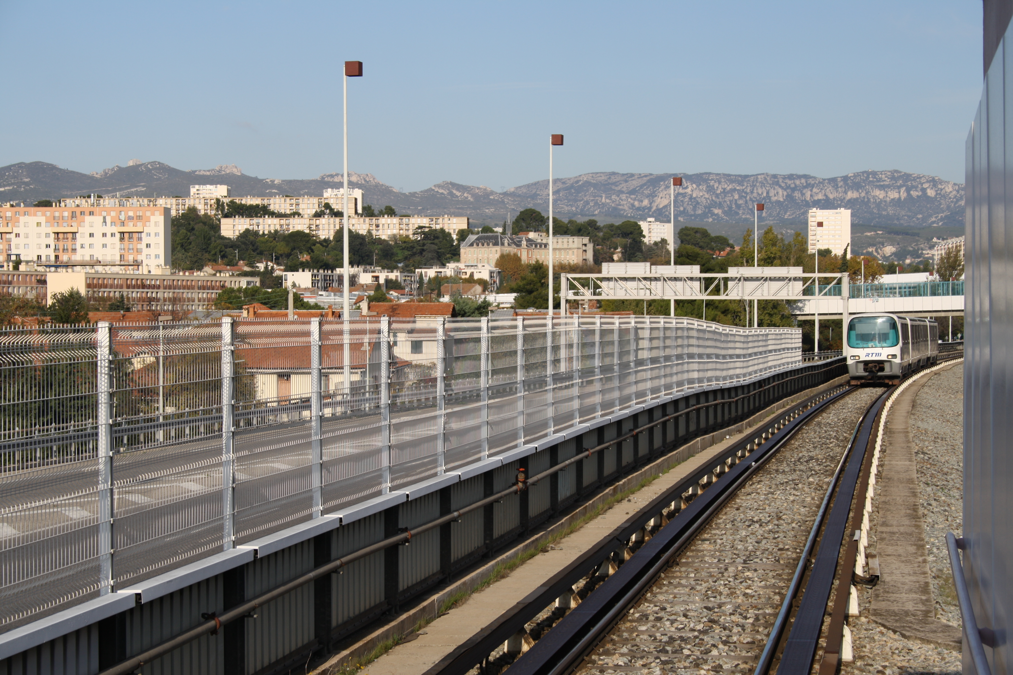 Métro Marseille Linie 1